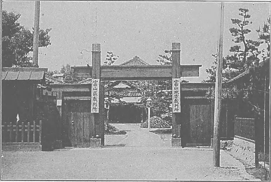 説明文に「富山市総曲輪に在り明治九年の創設にして区裁判所四出張所十九を管轄す」とあり。